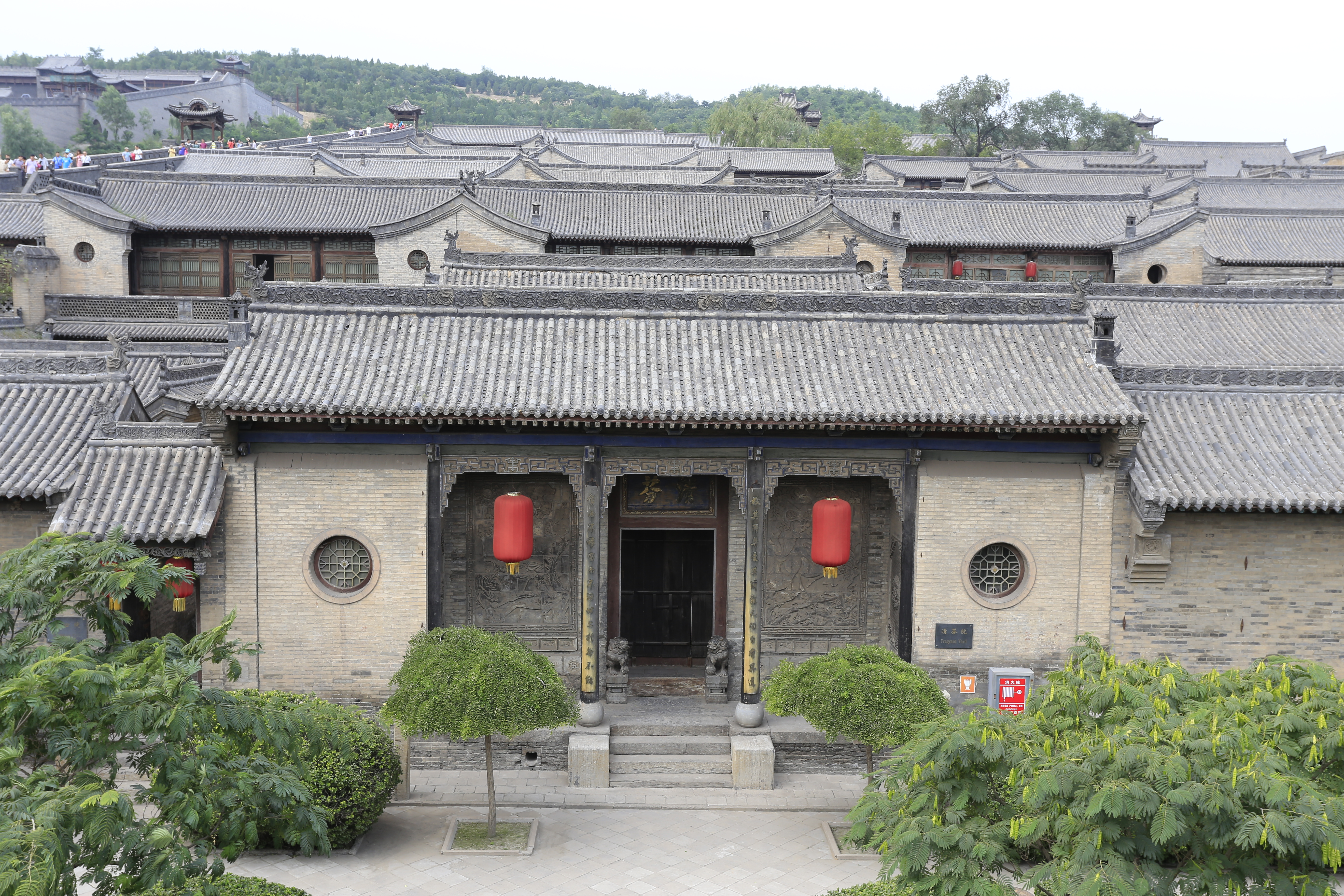 灵石静升王家大院 —— 西院（红门堡）